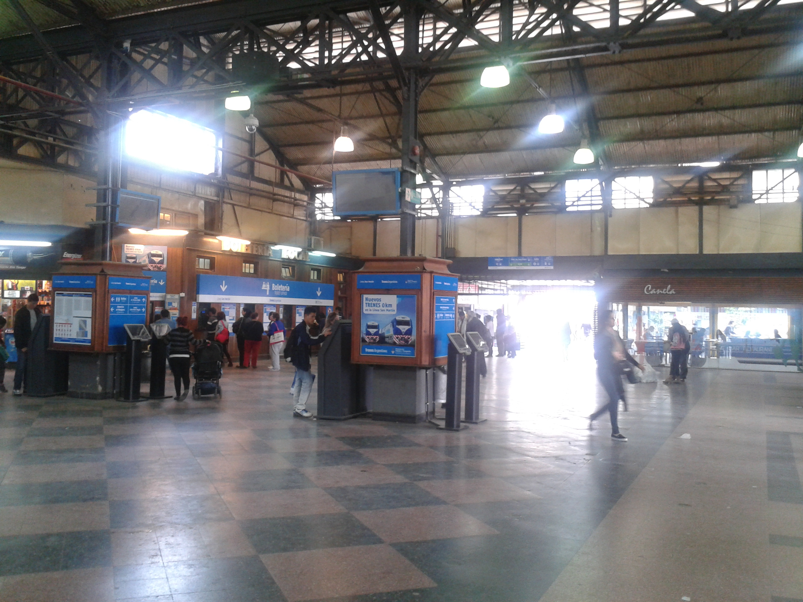 Panorama del hall y boleterías